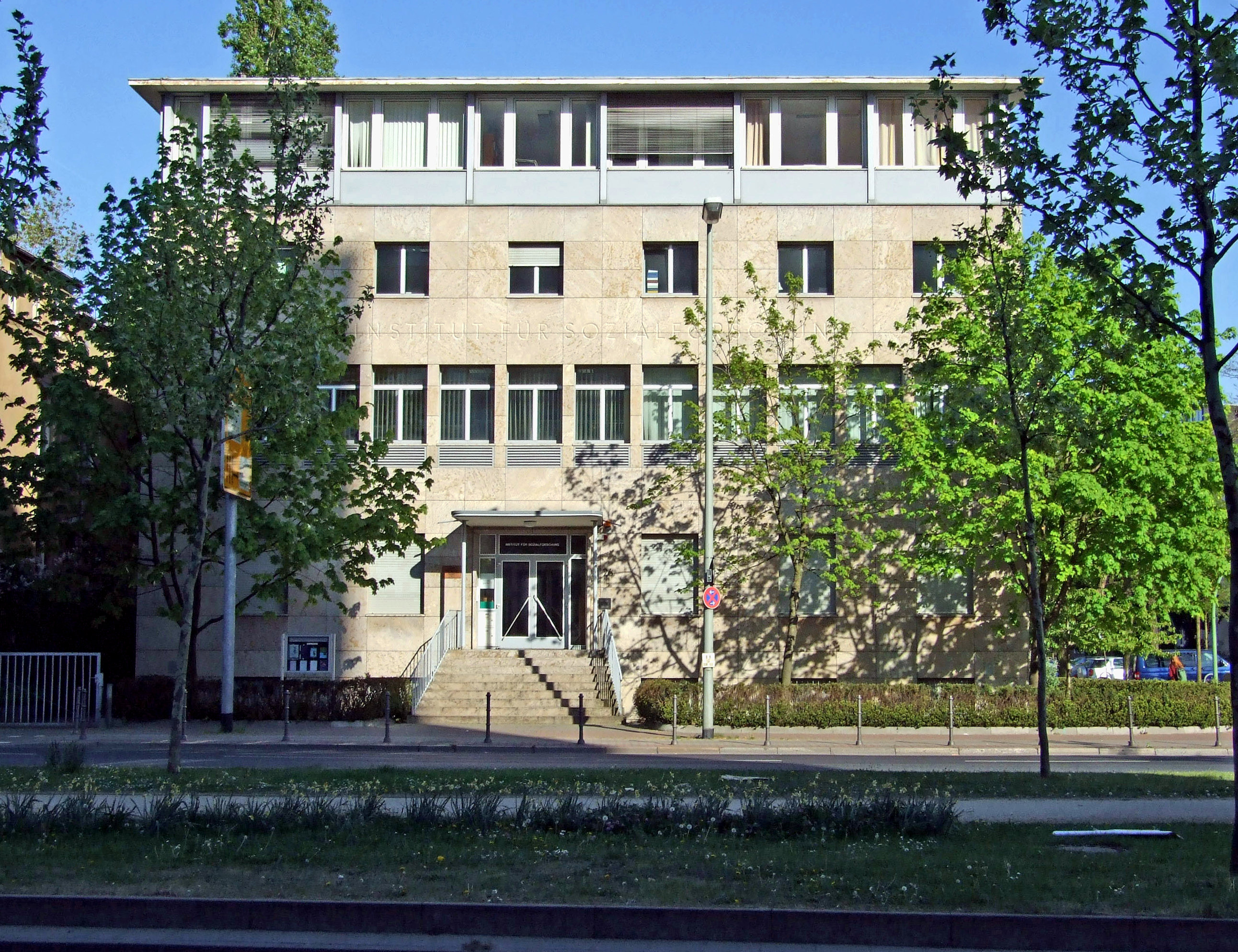 Das „Frankfurter Institut für Sozialforschung“ an der „Senckenberganlage“